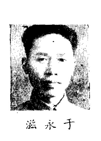 中文（中国大陆）: 制憲國民大會代表